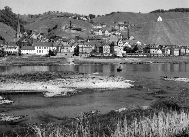 Ürzig, Mosel/Rheinland-Pfalz Ürzig, im Weindorf am rechten Moselufer mit schönen Fachwerkhäusern, hoch ausgedehnte Weinberge, die mitunter hinter dem Ort ansteigen. Der Ürziger Würzgarten ist die bekannteste Lage.